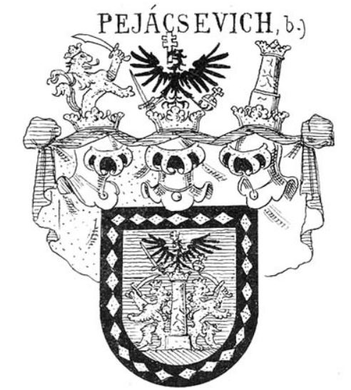 A Pejácsevich család grófi cimere - Siebmacher.